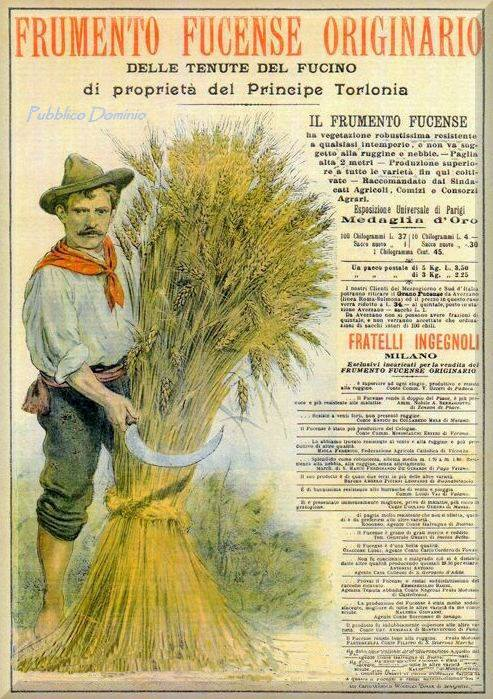 Illustrazione che presenta il nuovo frumento del Fucino all'esposizione di Parigi del 1889